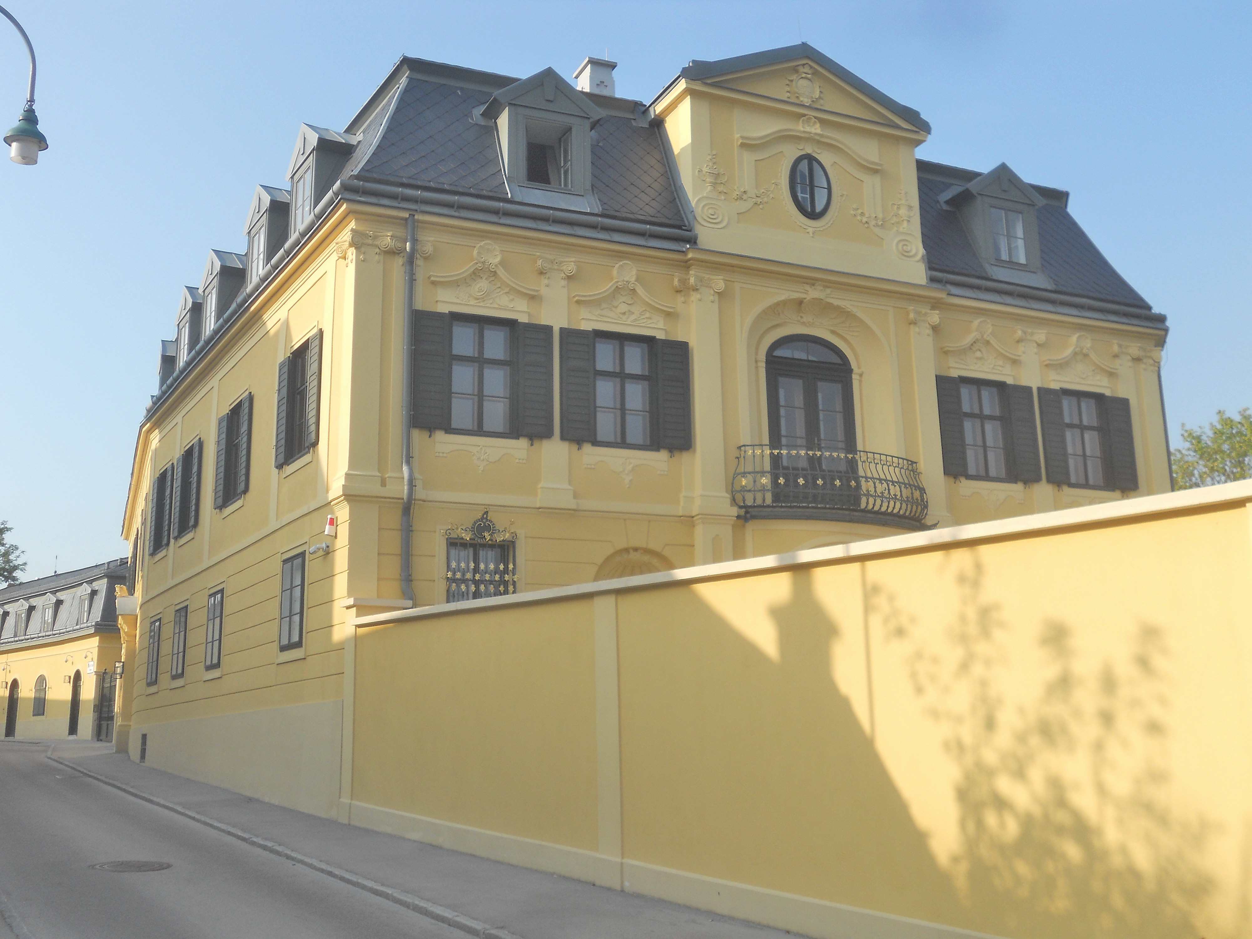 Martinschlössl